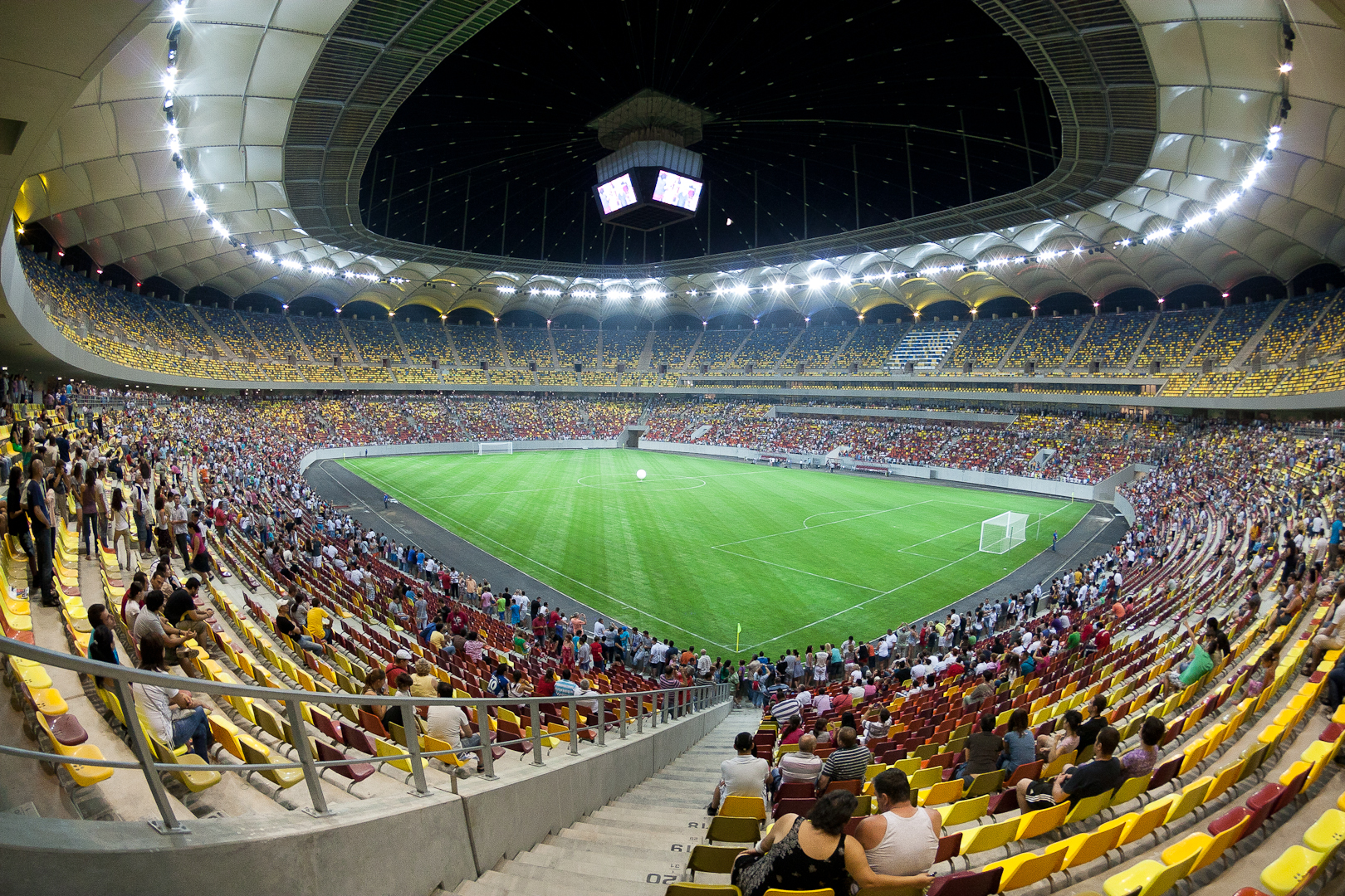 Stadionul National - National Arena